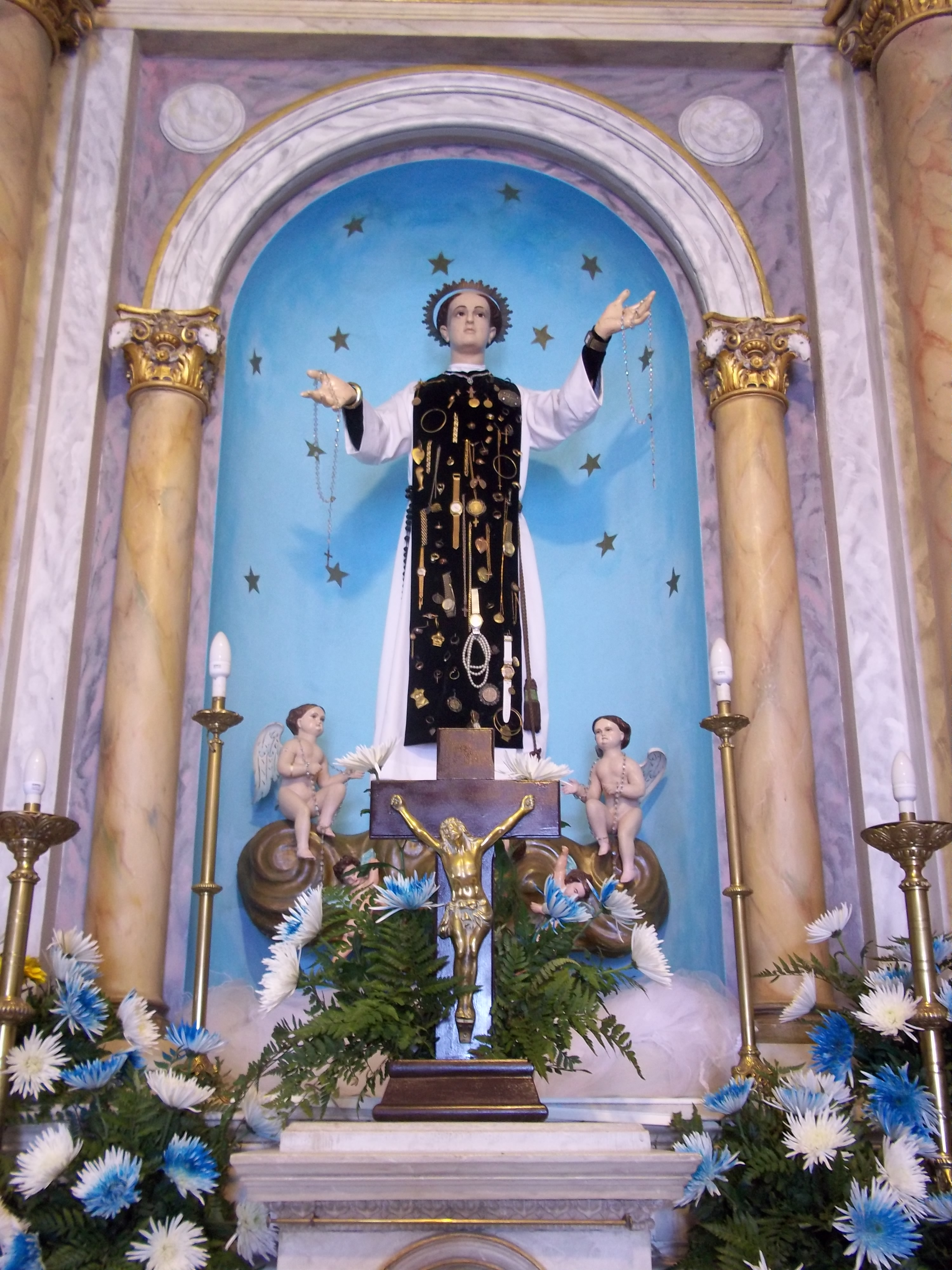 Imagen de San Cono (Cono de Teggiano) que se encuentra en la Iglesia de San Cono en Florida, Uruguay. Es venerado en una peregrinación multitudinaria cada 3 de junio. La estatua está construida en madera y fue traída desde Teggiano alrededor de 1890. Fue encargada a Italia por Blás Eloy en 1883.